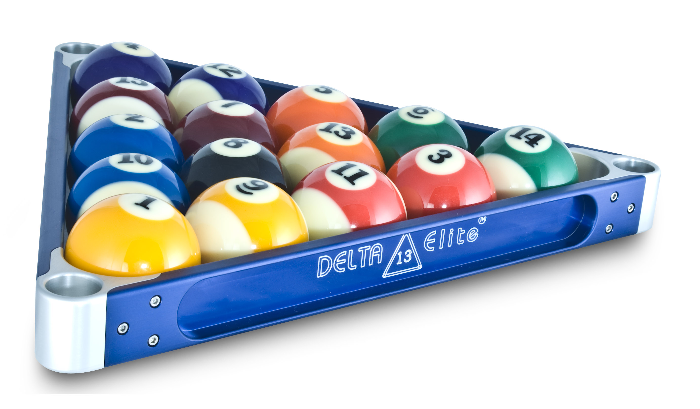 Delta 13 Elite pool rack, made from anodized 6061 aluminum